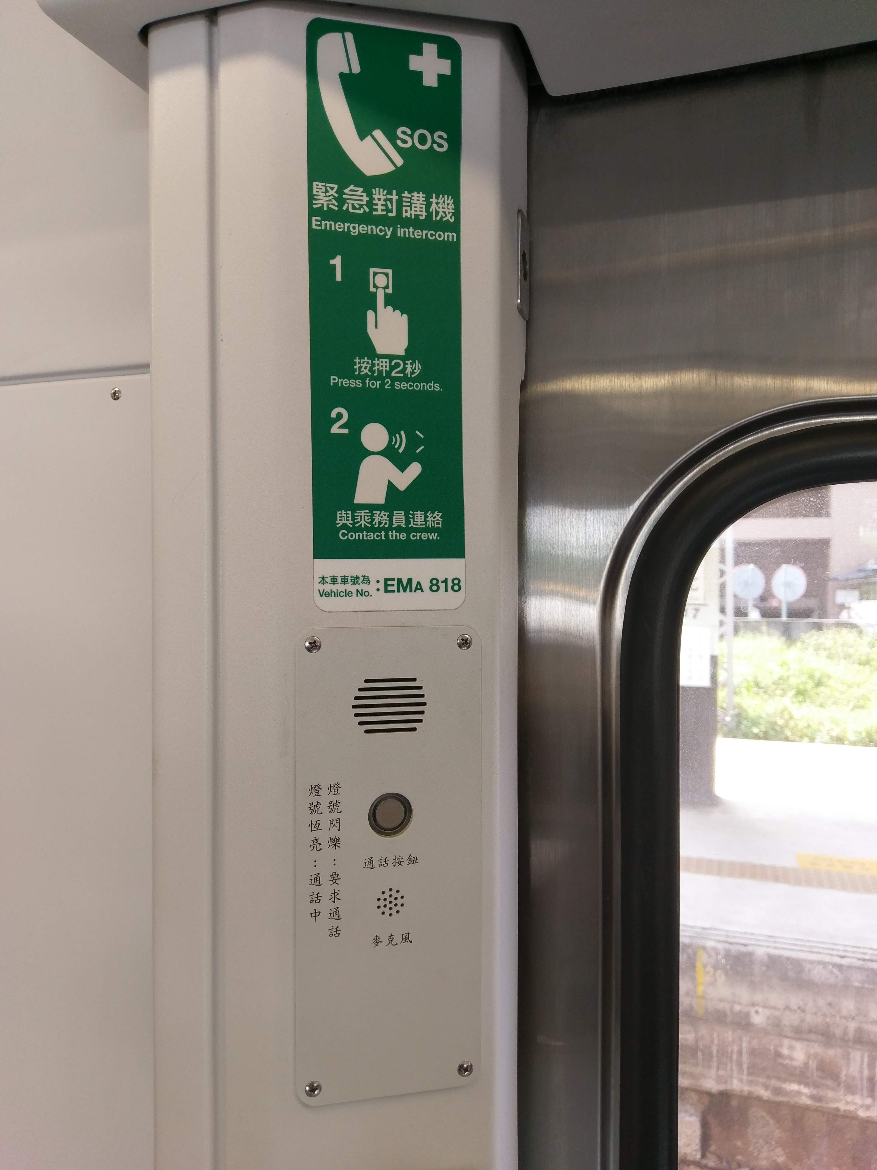 中文（台灣）: 台鐵EMU800型電聯車EMA818的車內緊急對講機